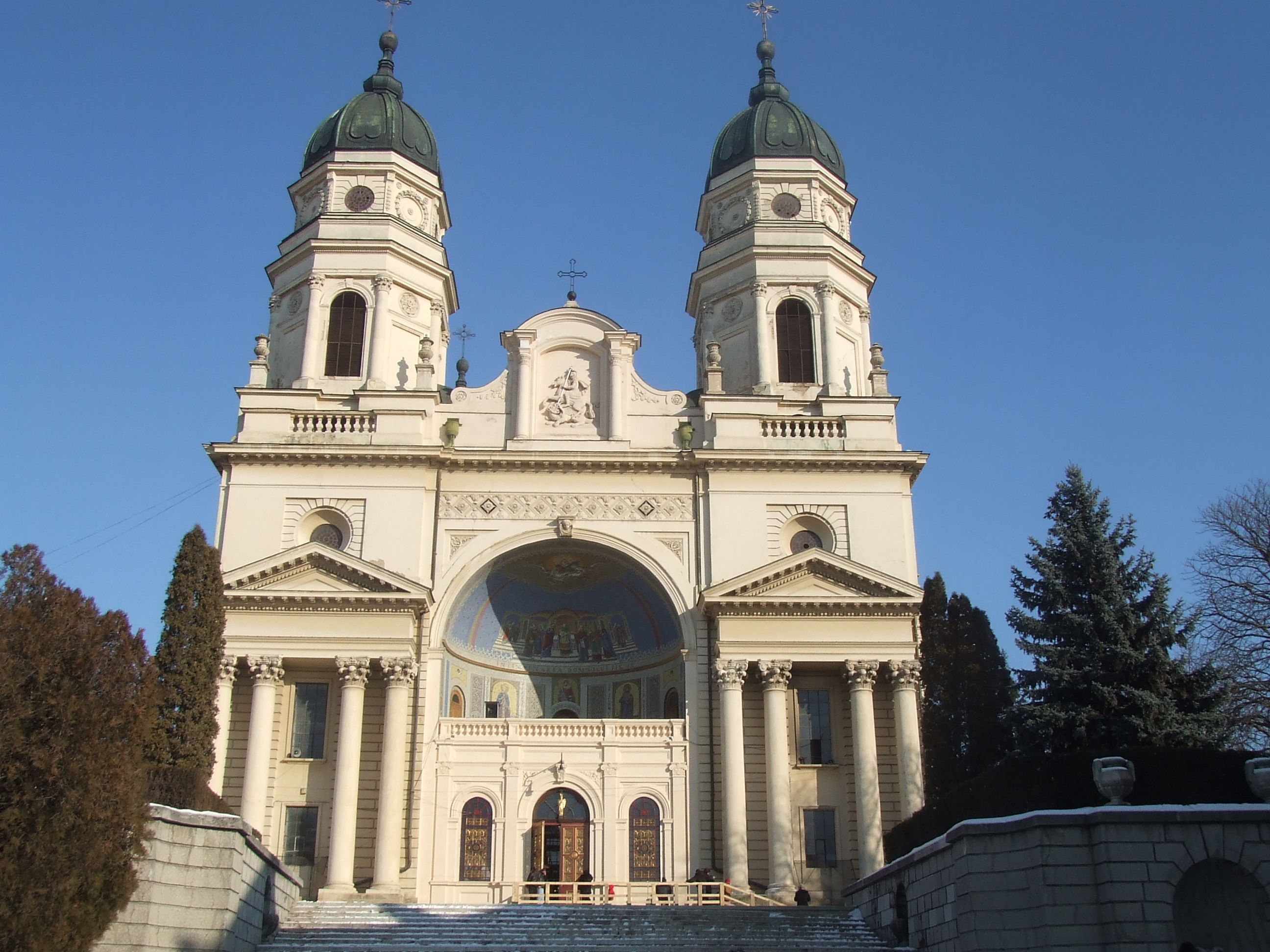 Metropolitan Cathedral, Iaşi, Romania